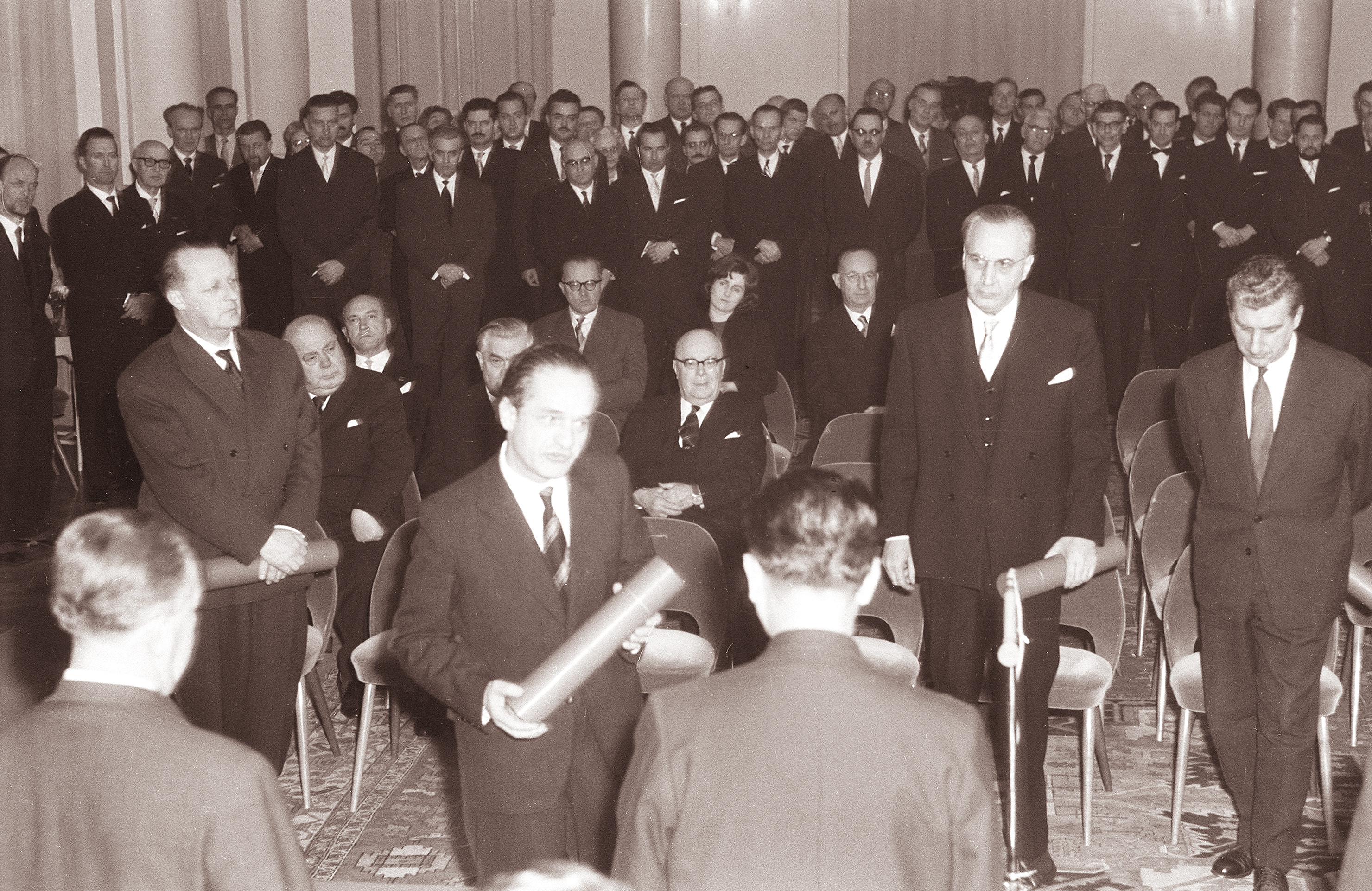 Podelitev Prešernovih nagrad. Od leve: Mile Klopčič, Dragotin Cvetko, Vladimir Skrbinšek in Edvard Ravnikar